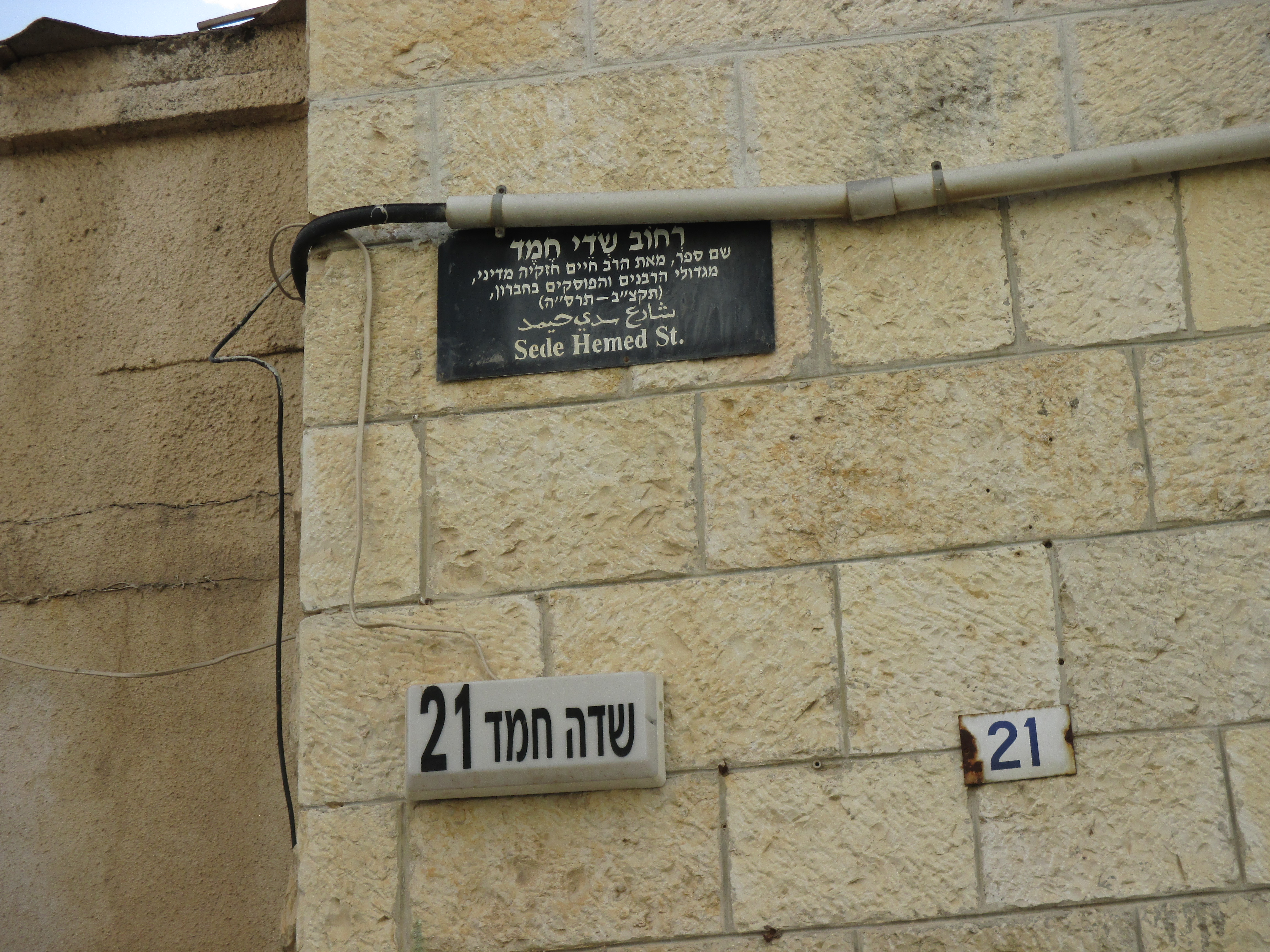 Jérusalem, 21 rue Sdei Hemed - En 1901, le Rav Chaim Hezekiah Medini ouvre une yeshiva dans le bâtiment Beit Romano à Hébron. C'est là qu'il met la dernière main à La Grande Encyclopédie talmudique «Sdei Hemed» (שדי חמד).